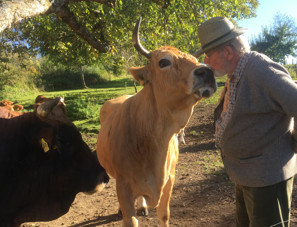 Volker Zahn mit seiner Murnau Werdenfelser Leitkuh Romy